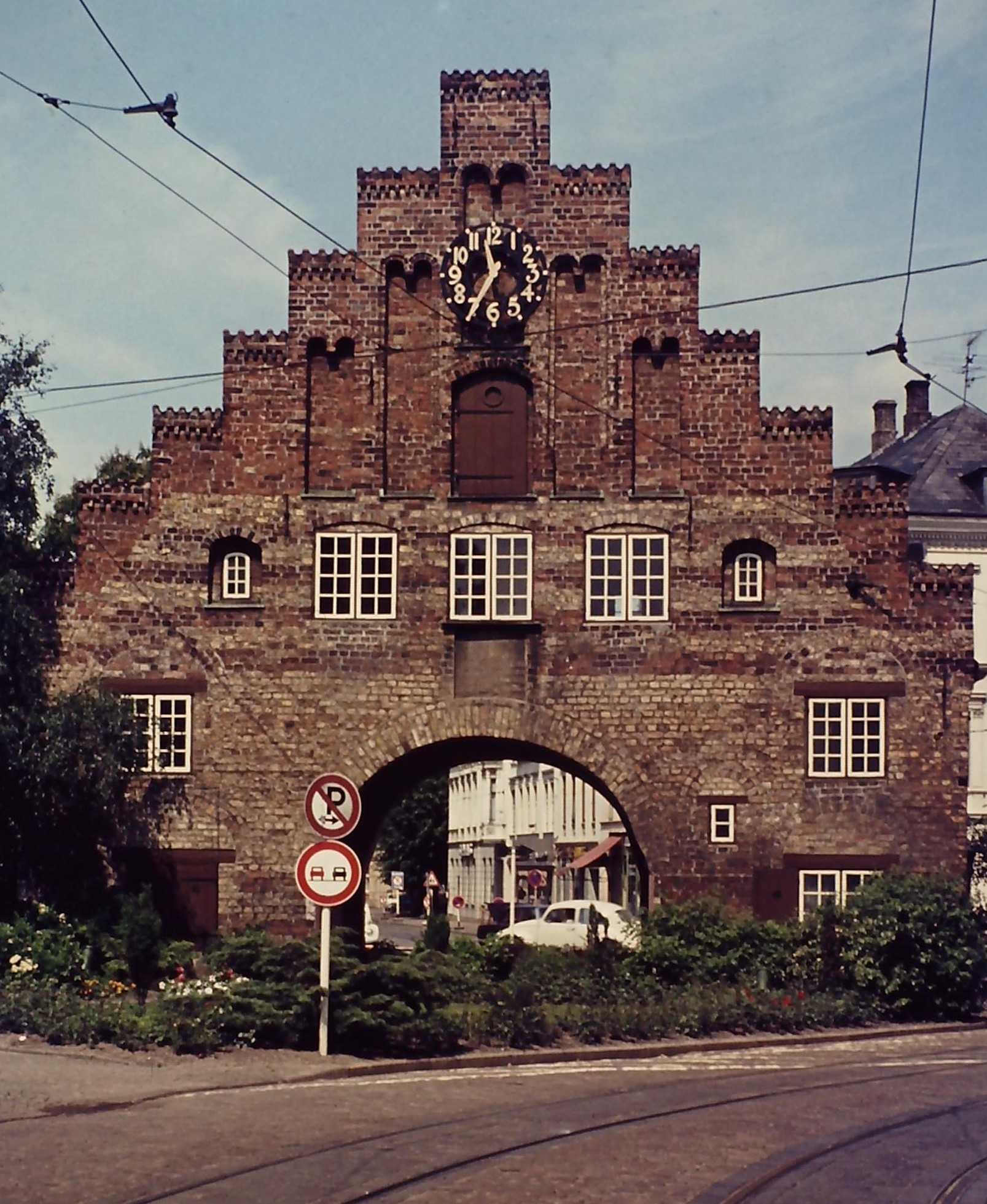 Nordertor Flensburg (Sommer 1972)